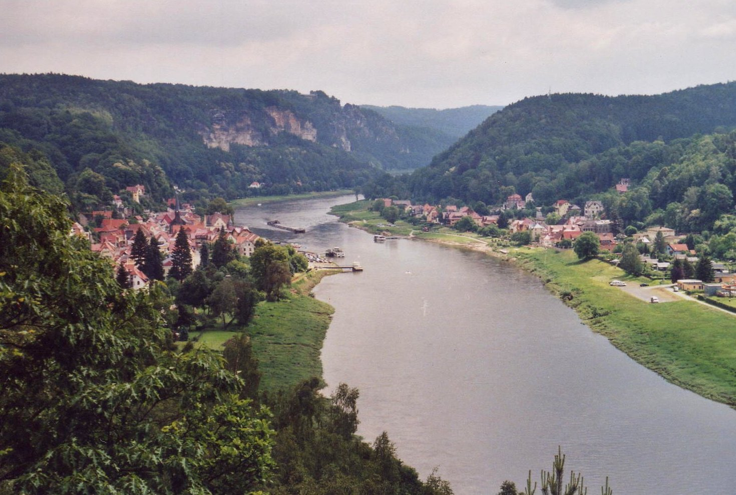 Blick auf Stadt Wehlen (links) und Pötzscha (rechts)